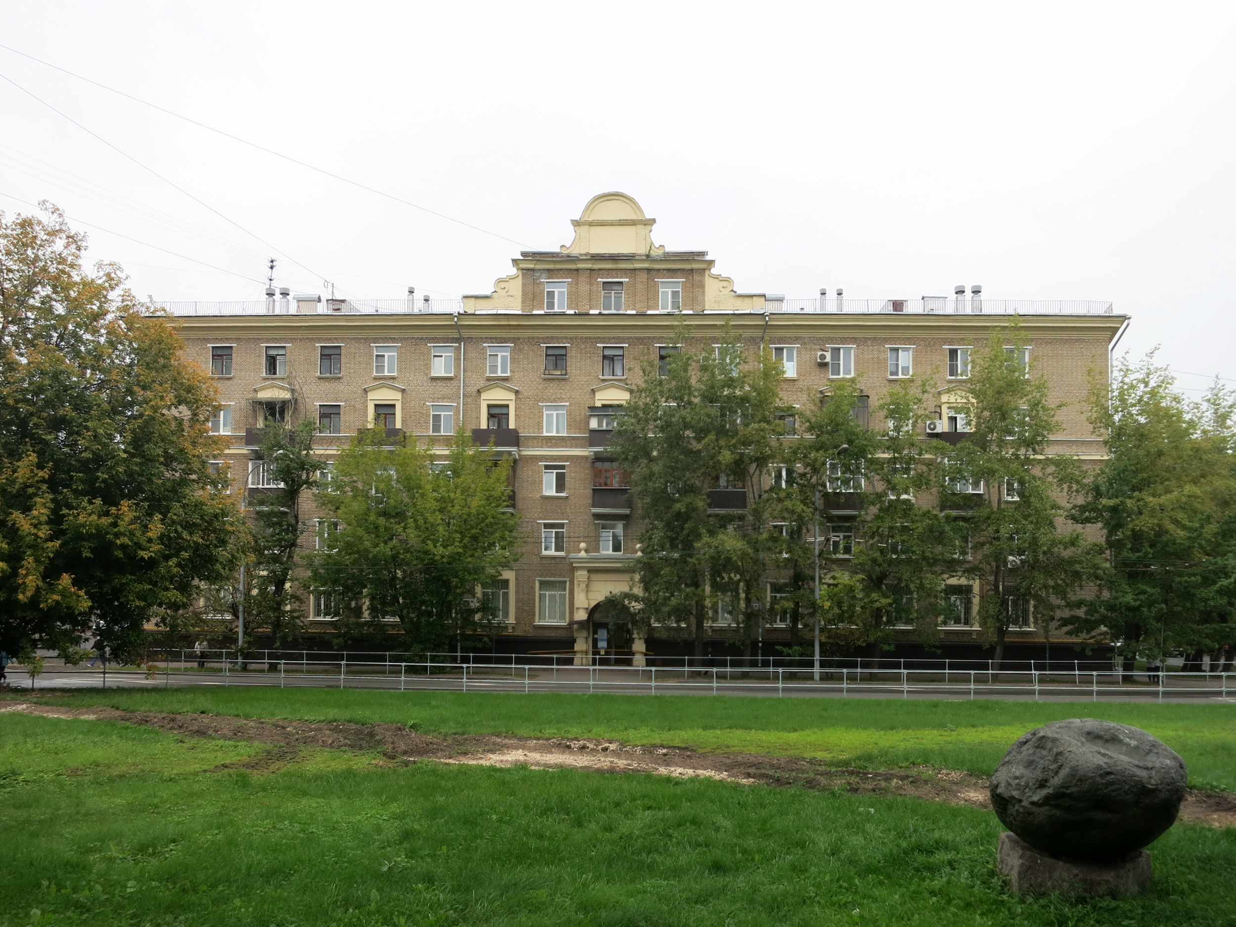 Новогиреевская ул., д. 47/26. Кирпичный жилой дом, построен в 1954 году (Москва). По всей длине дом пятиэтажный за исключением небольшой надстройки над центральным подъездом.